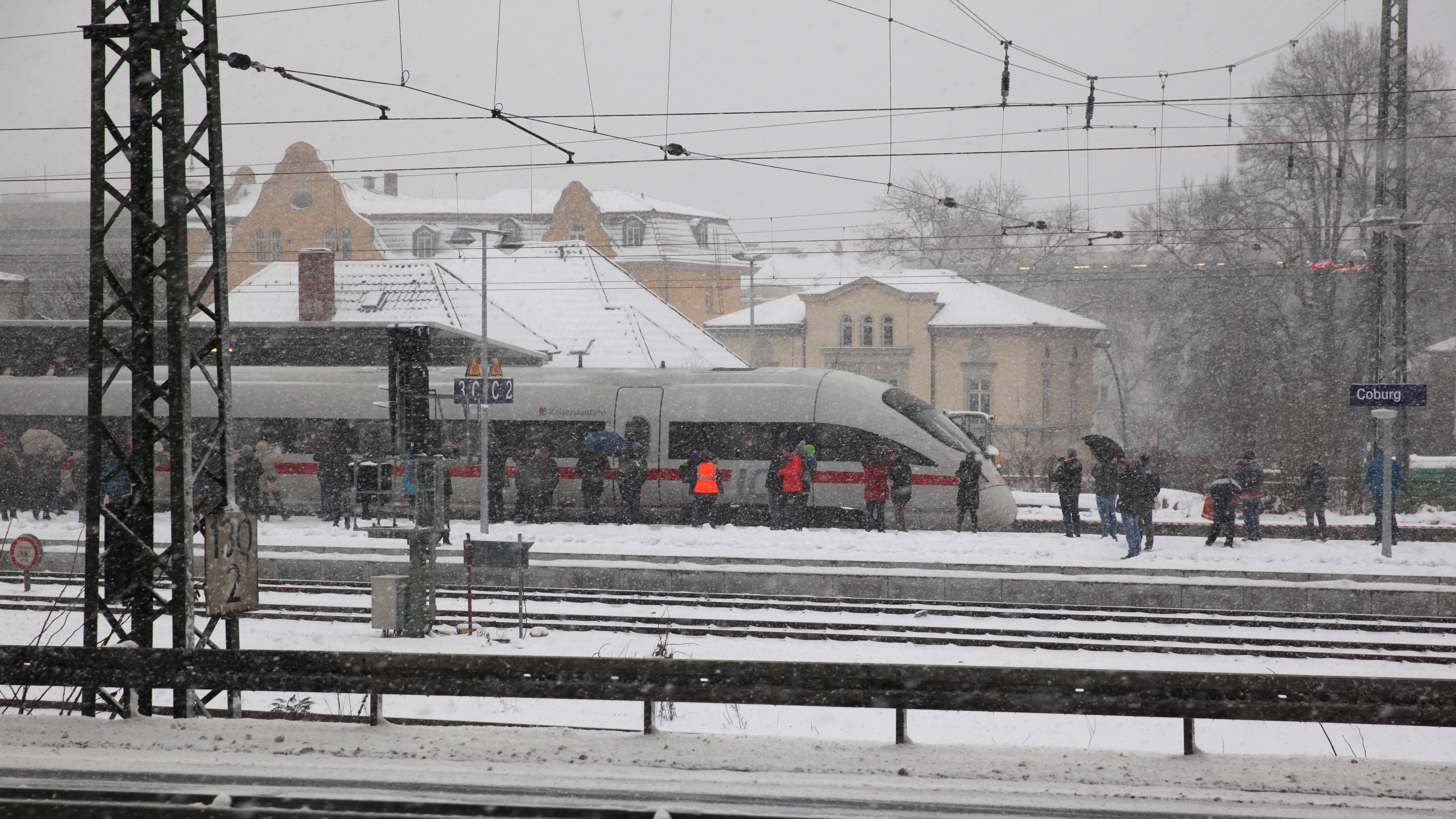 Coburg Bahnhof, ICE 1511, erster planmäßiger ICE